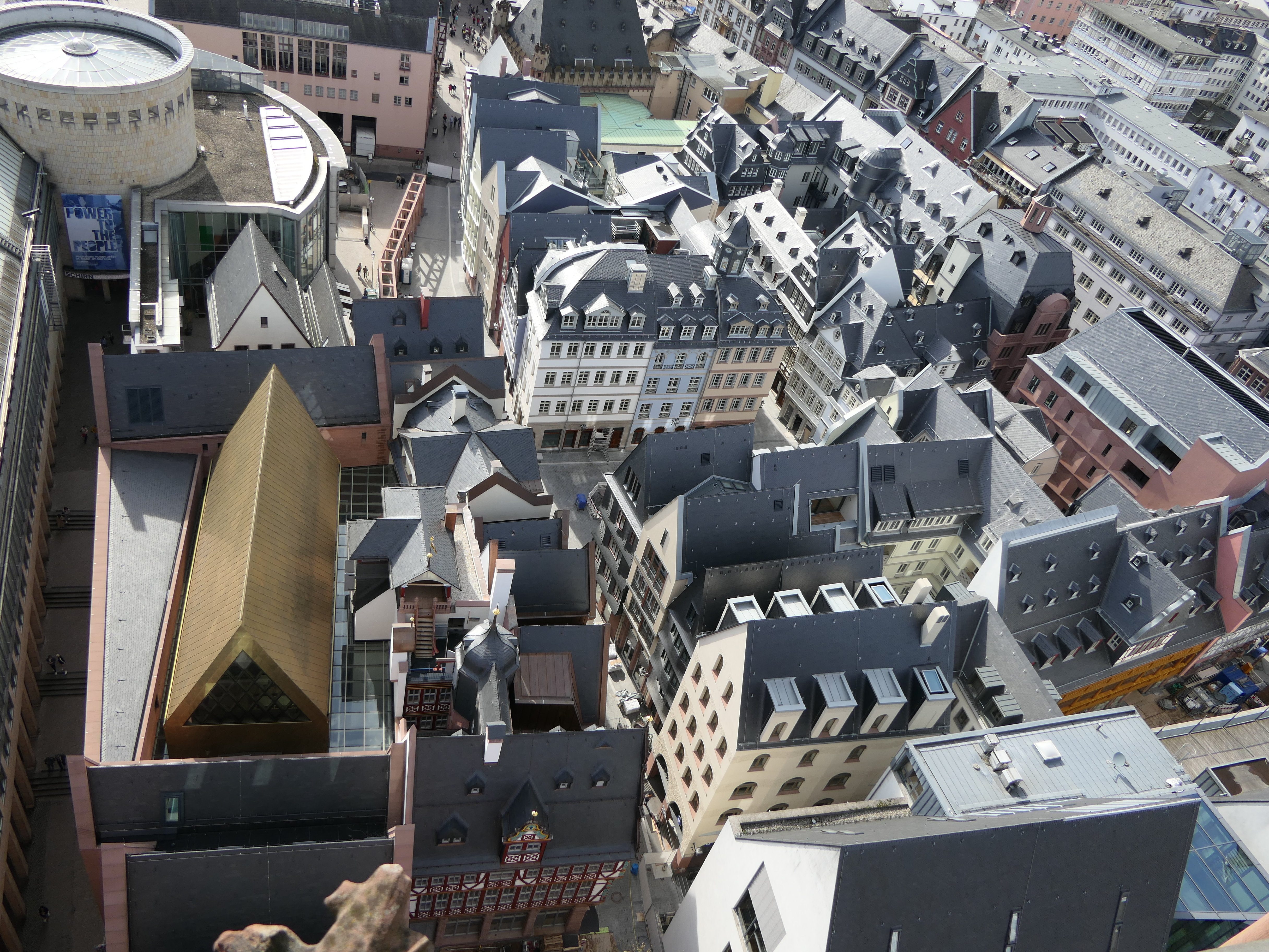 Blick vom Dom auf das Dom-Römer-Areal in Frankfurt, das nun äußerlich nahezu fertig ist, Mitte April 2018.